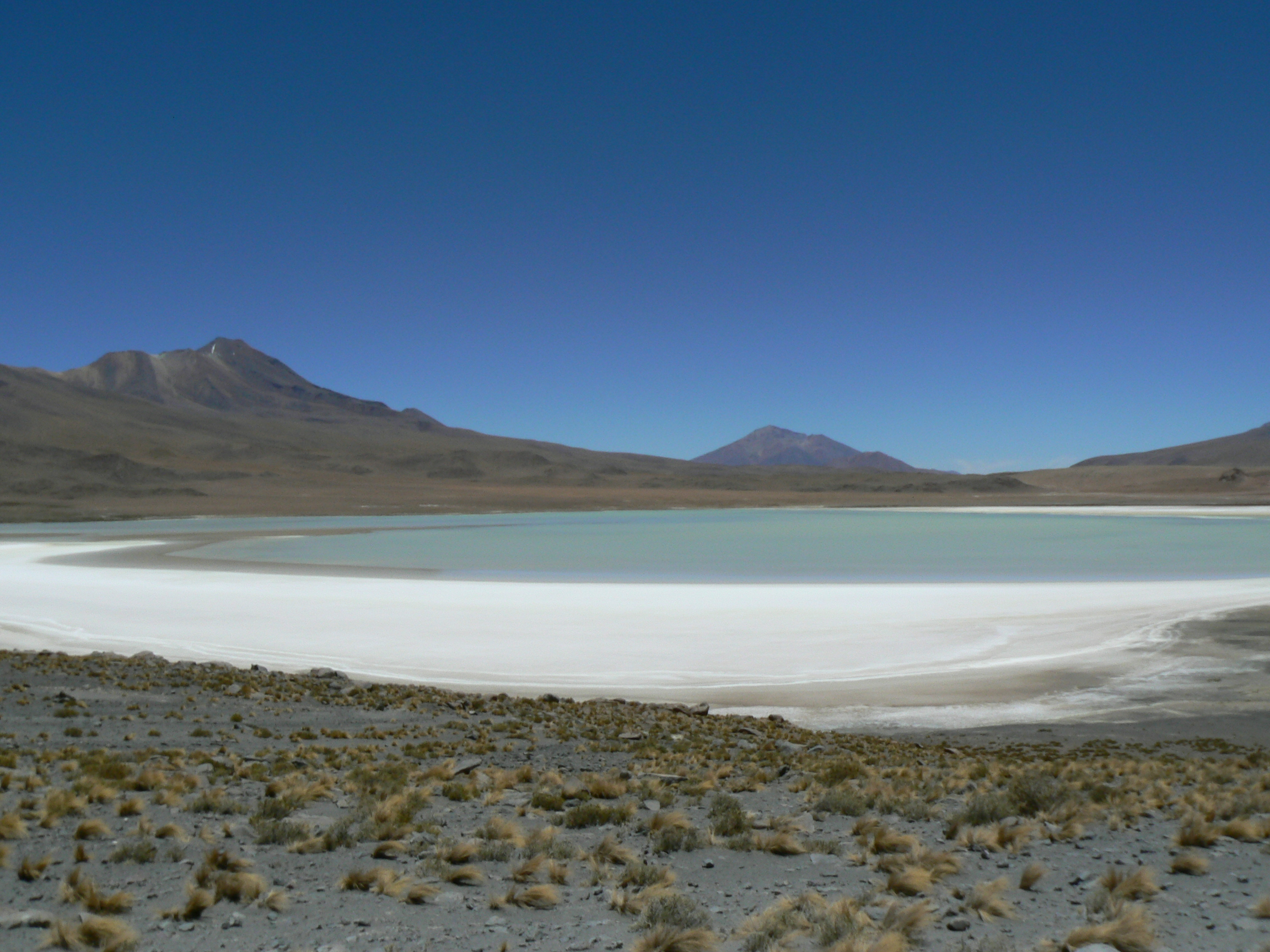 Laguna Hedionda, Bolivia